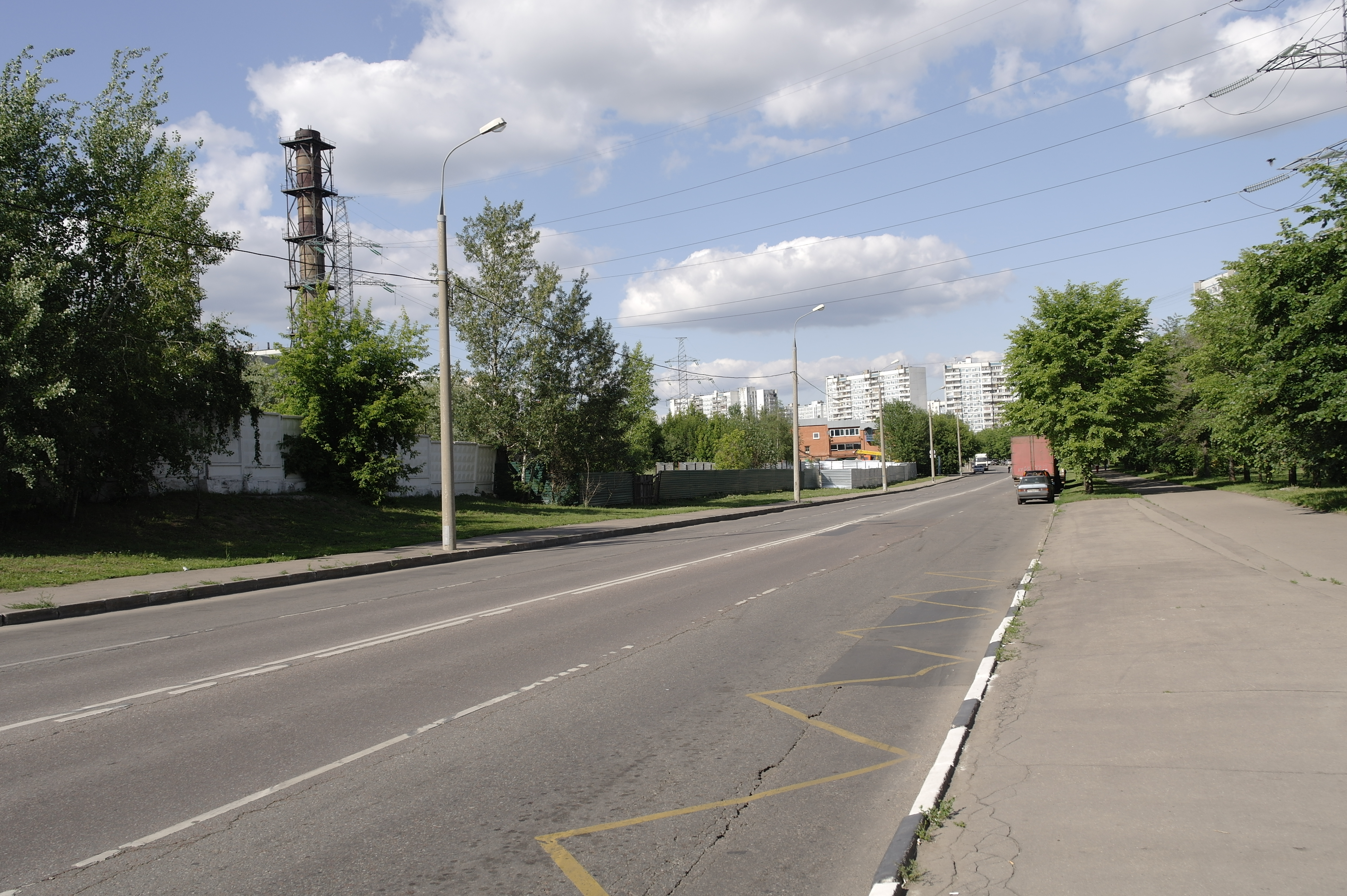 Ижорский проезд в сторону Лобненской улицы